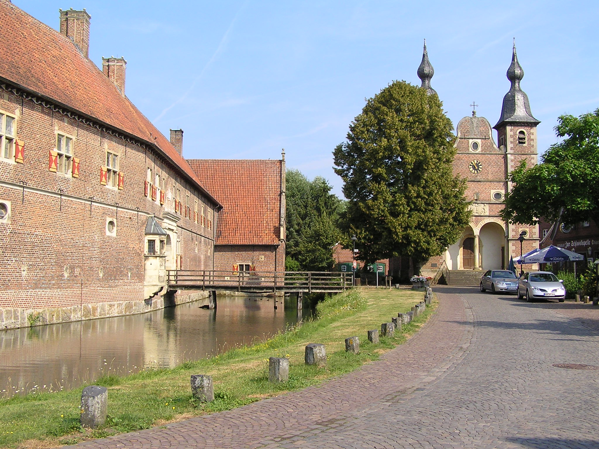 Portal der Schlosskapelle St. Sebastian und Ostseite der Vorburg von Schloss Raesfeld